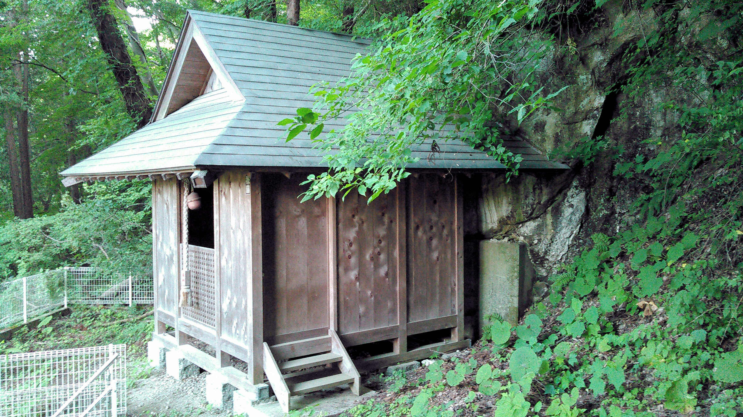 大峯不動尊(不動明王を祀る神社)の拝殿